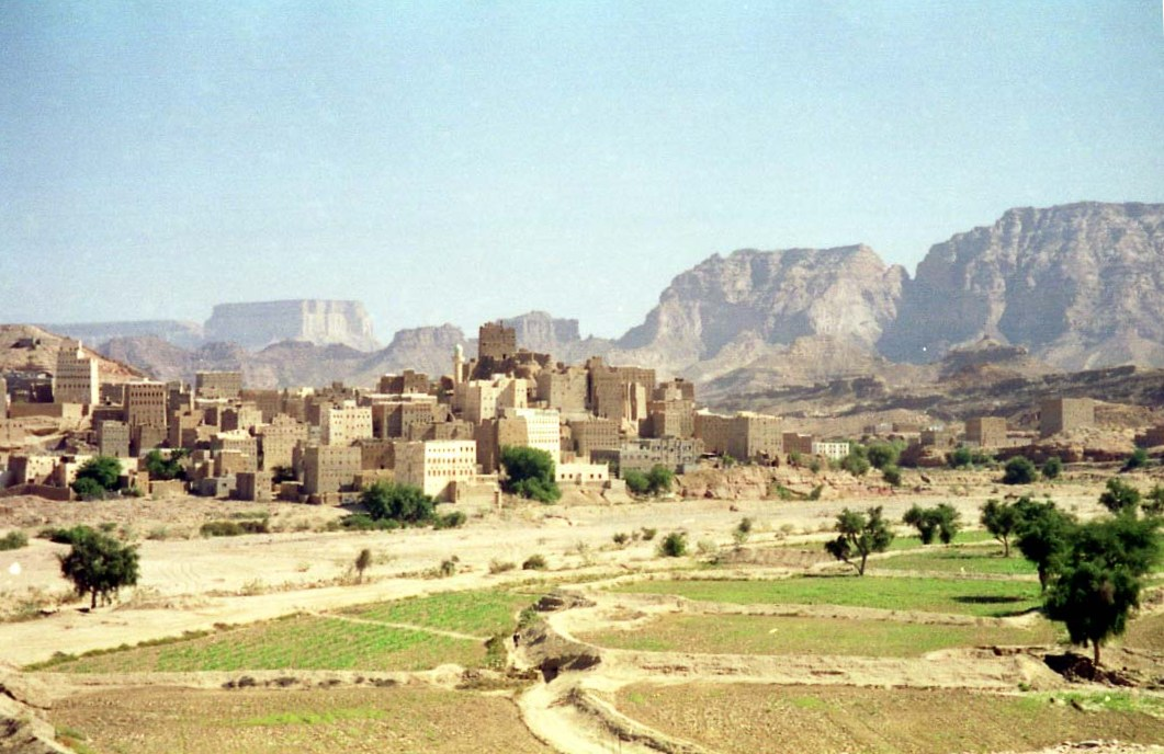 Habban Shabwa 27th December 1993